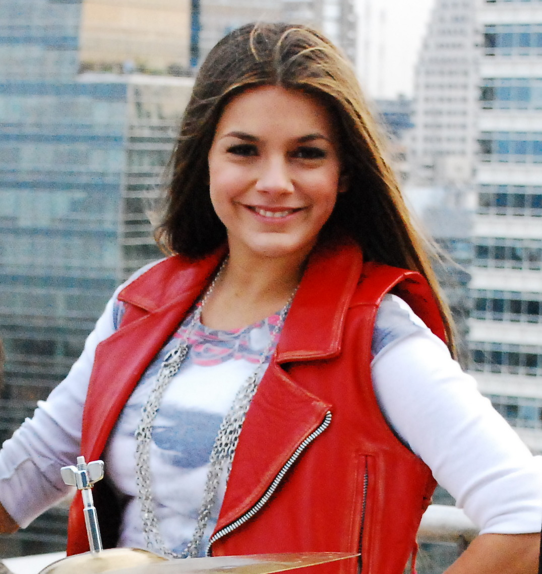 Consentidos